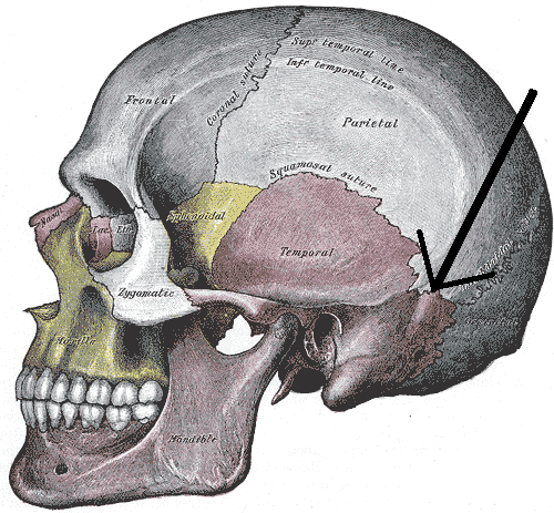 módosítva